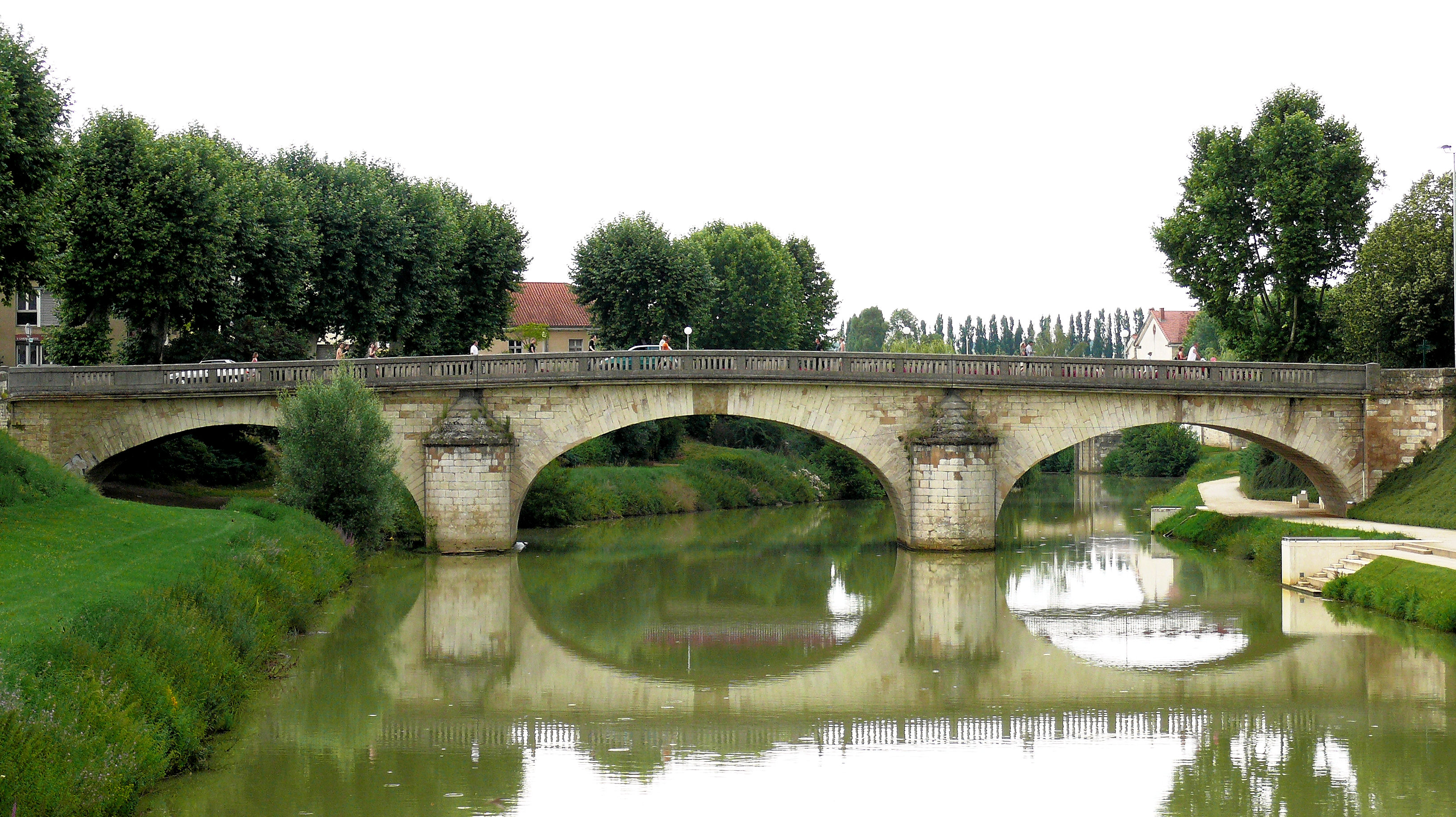 Auch - Pont de la Treille